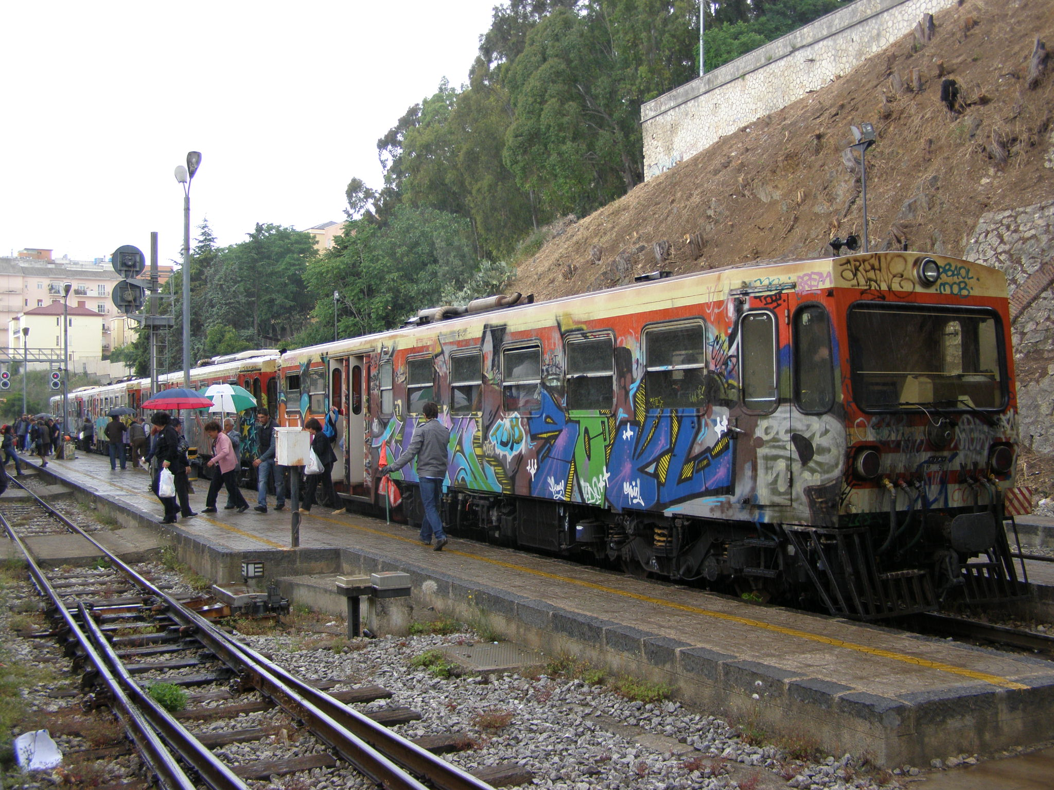 M4c.355 e altre tre automotrici a Catanzaro Città